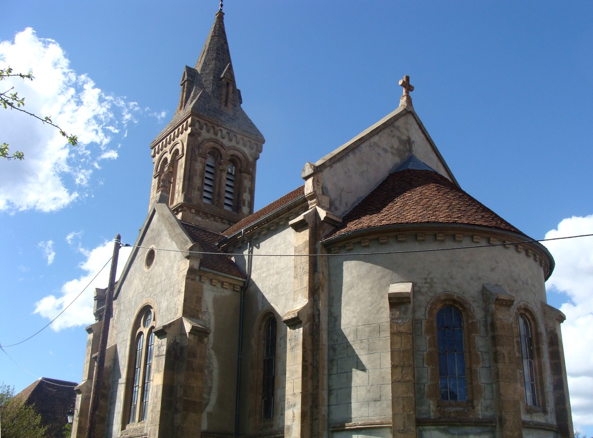 L'église de Croix-de-la-Pigne, commune de Pellafol (Isère) : chevet. Abside en cul-de-four avec toit conique couvert en tuiles-écailles.